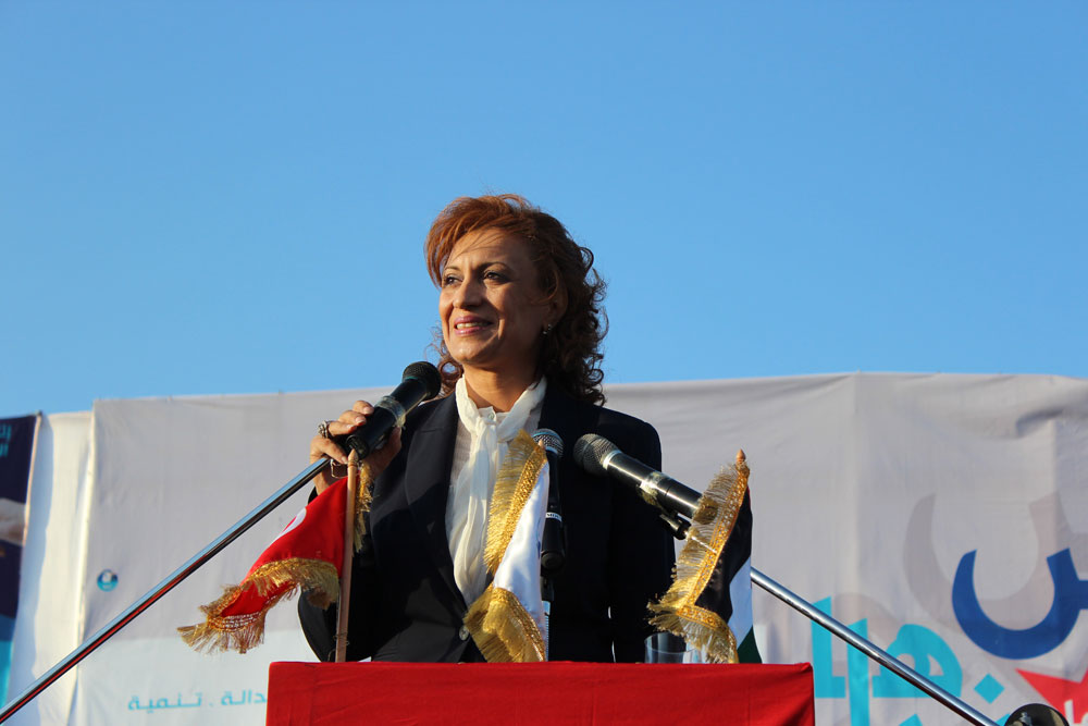 Souad Abderrahim, candidate du parti Ennahda à l'élection de l'assemblée constituante tunisienne du 23 octobre 2011, à un meeting de campagne à Ben Arous